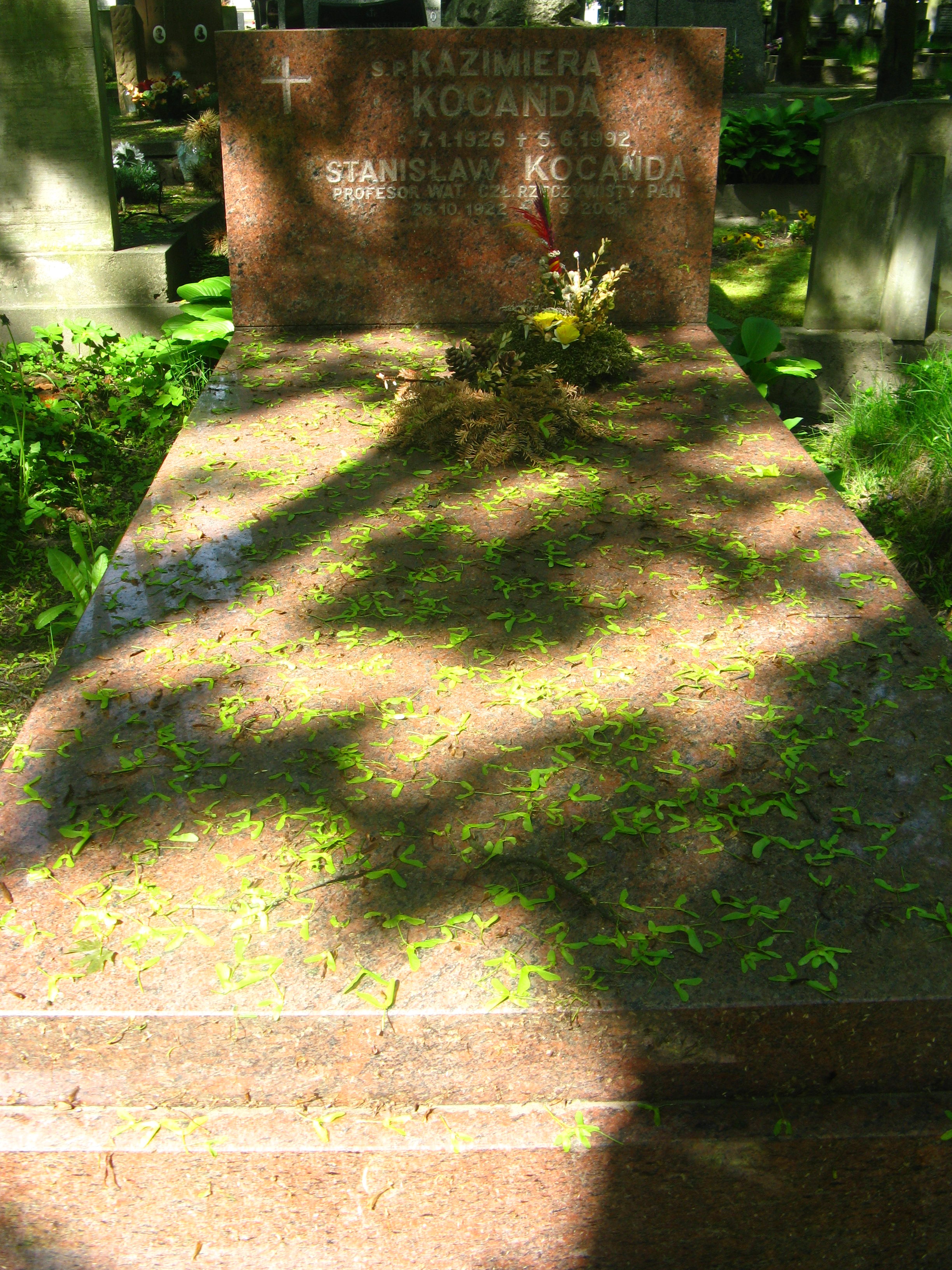 Grób Stanisława Kocańdy na Cmentarzu Powązkowskim w Warszawie